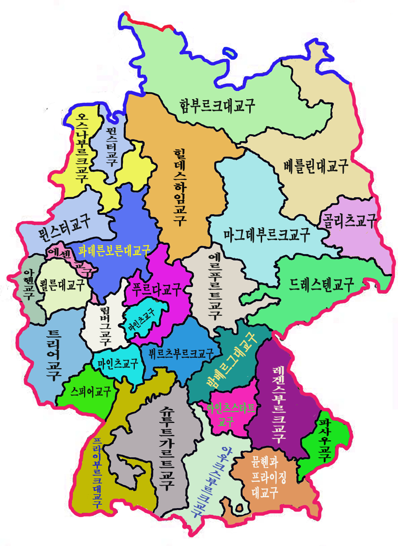 독일가톨릭 교구지도